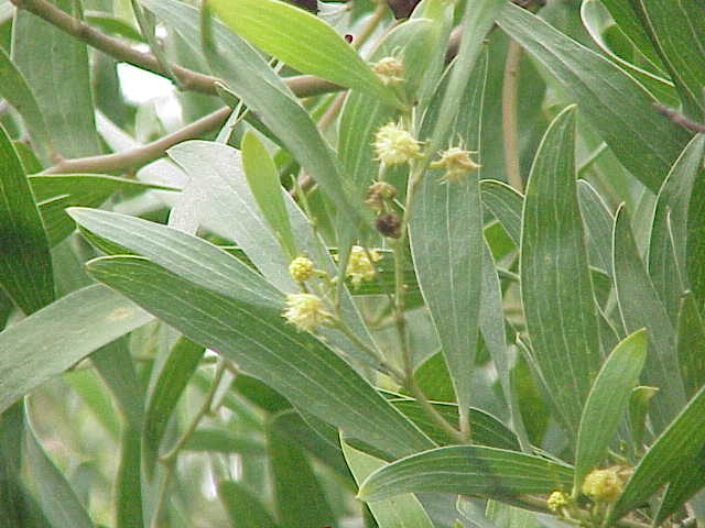 Species: Acacia verticillata Acacia melanoxylon Family: Fabaceae Image No. 1